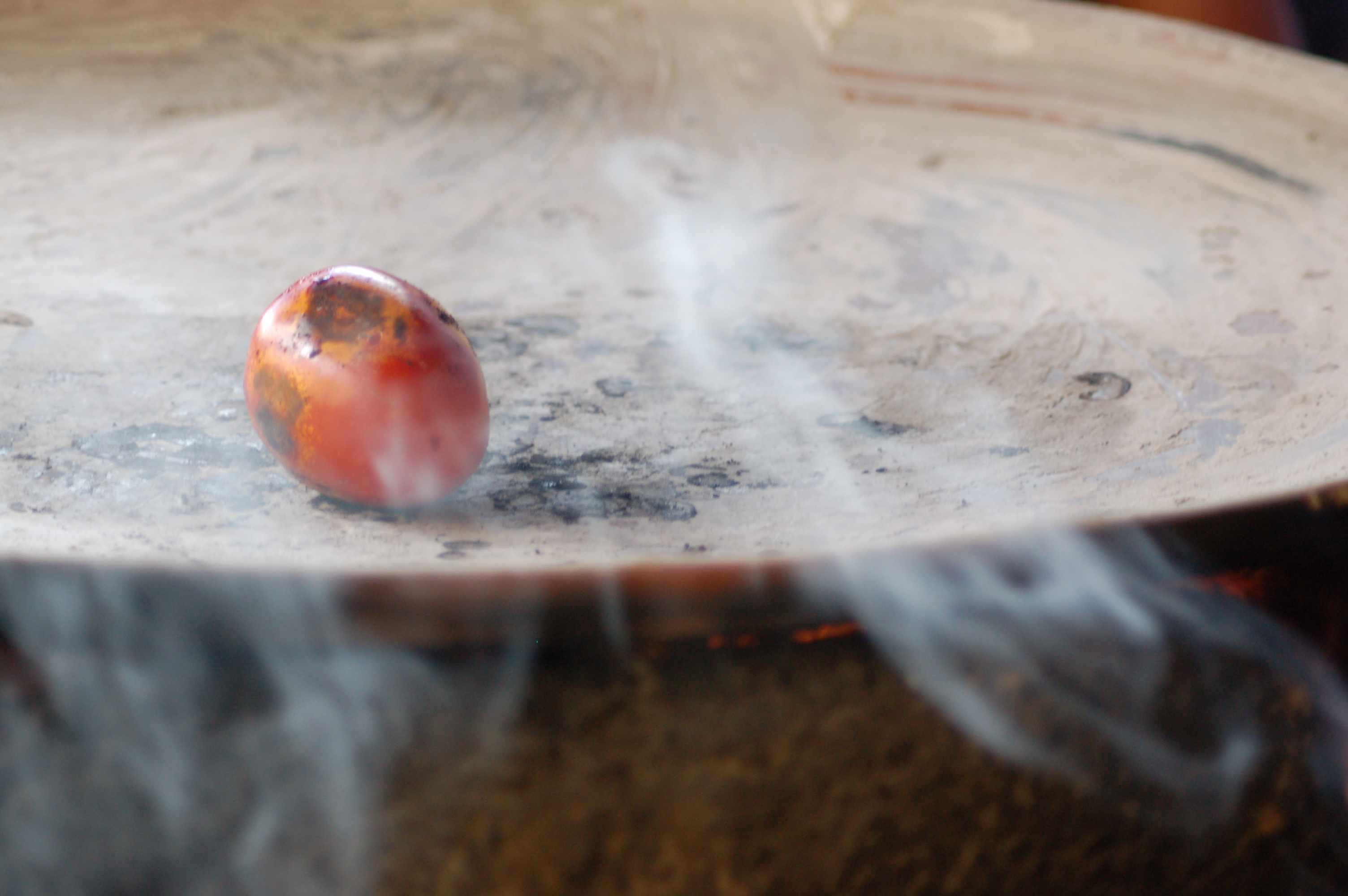 A tomato roasting on a barro comal in Oaxaca, Mexico.